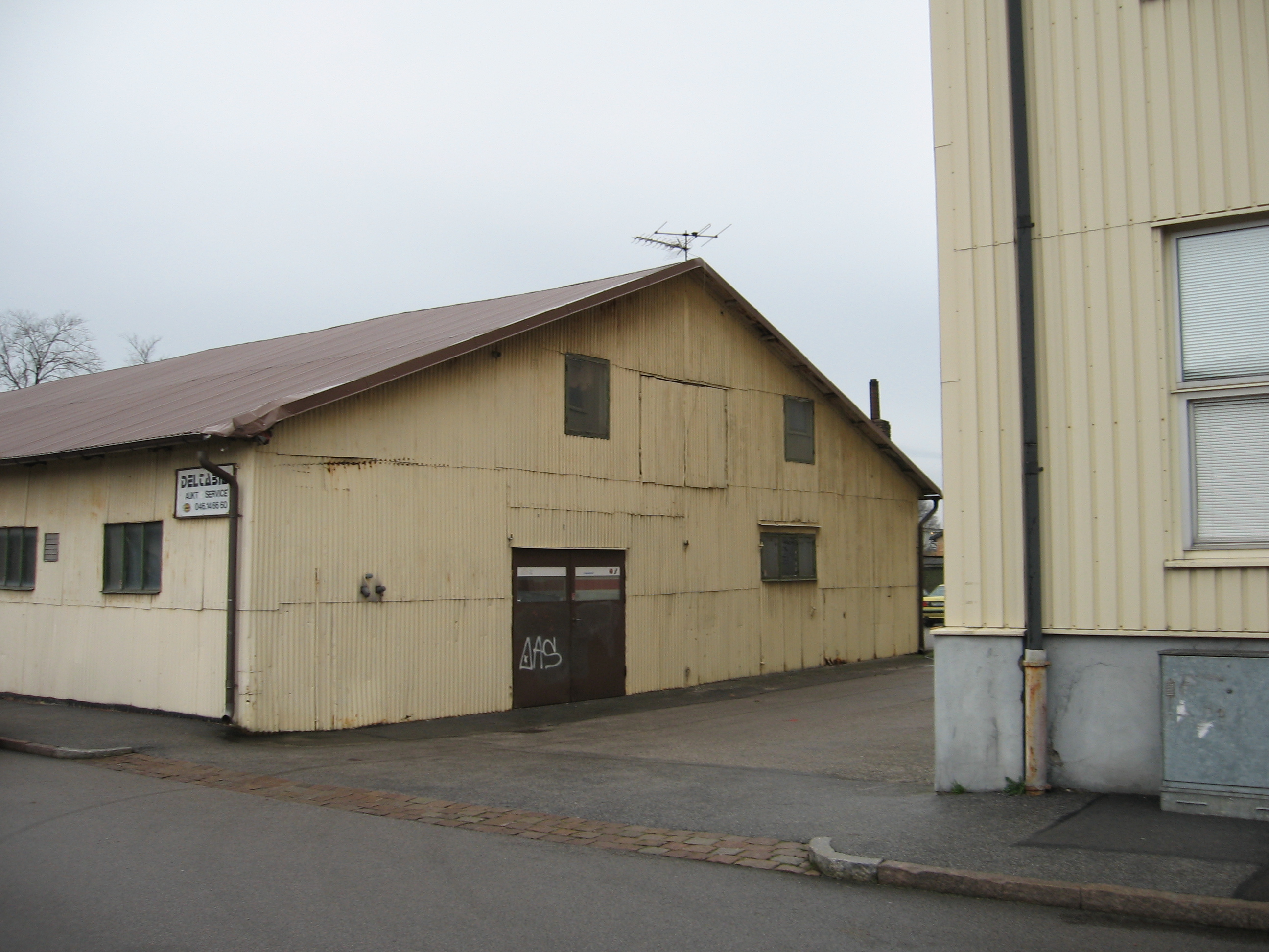 DELTABIL i Lund, rivet april 2008.